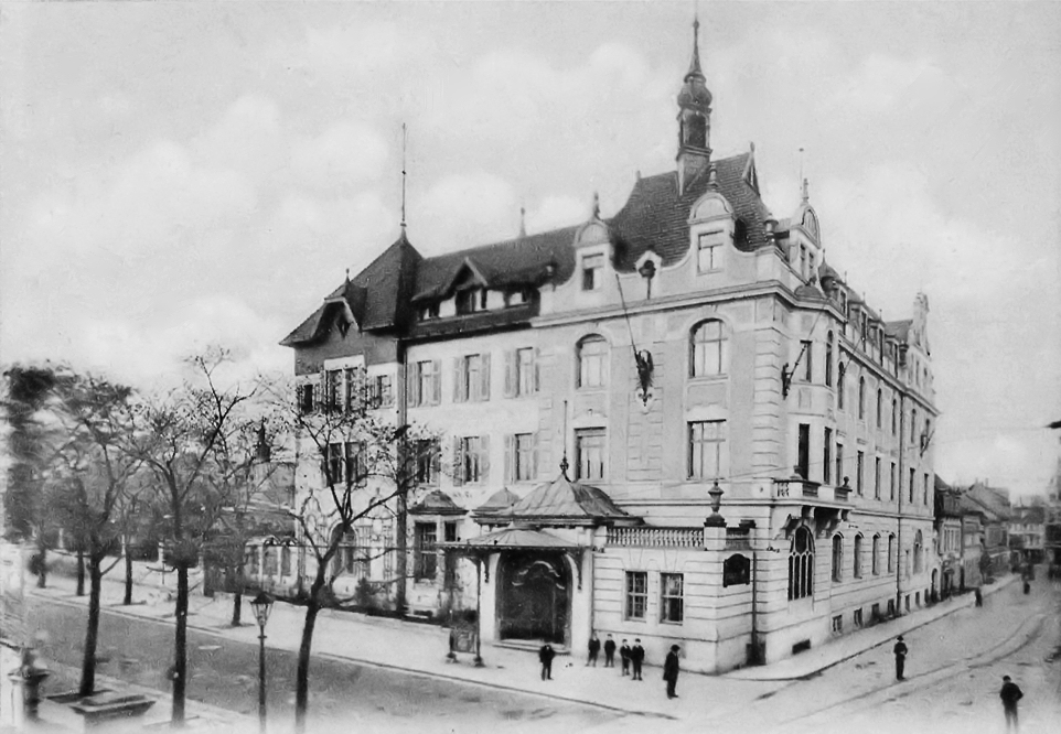 Kruppsches Privathotel Essener Hof, eröffnet 1898